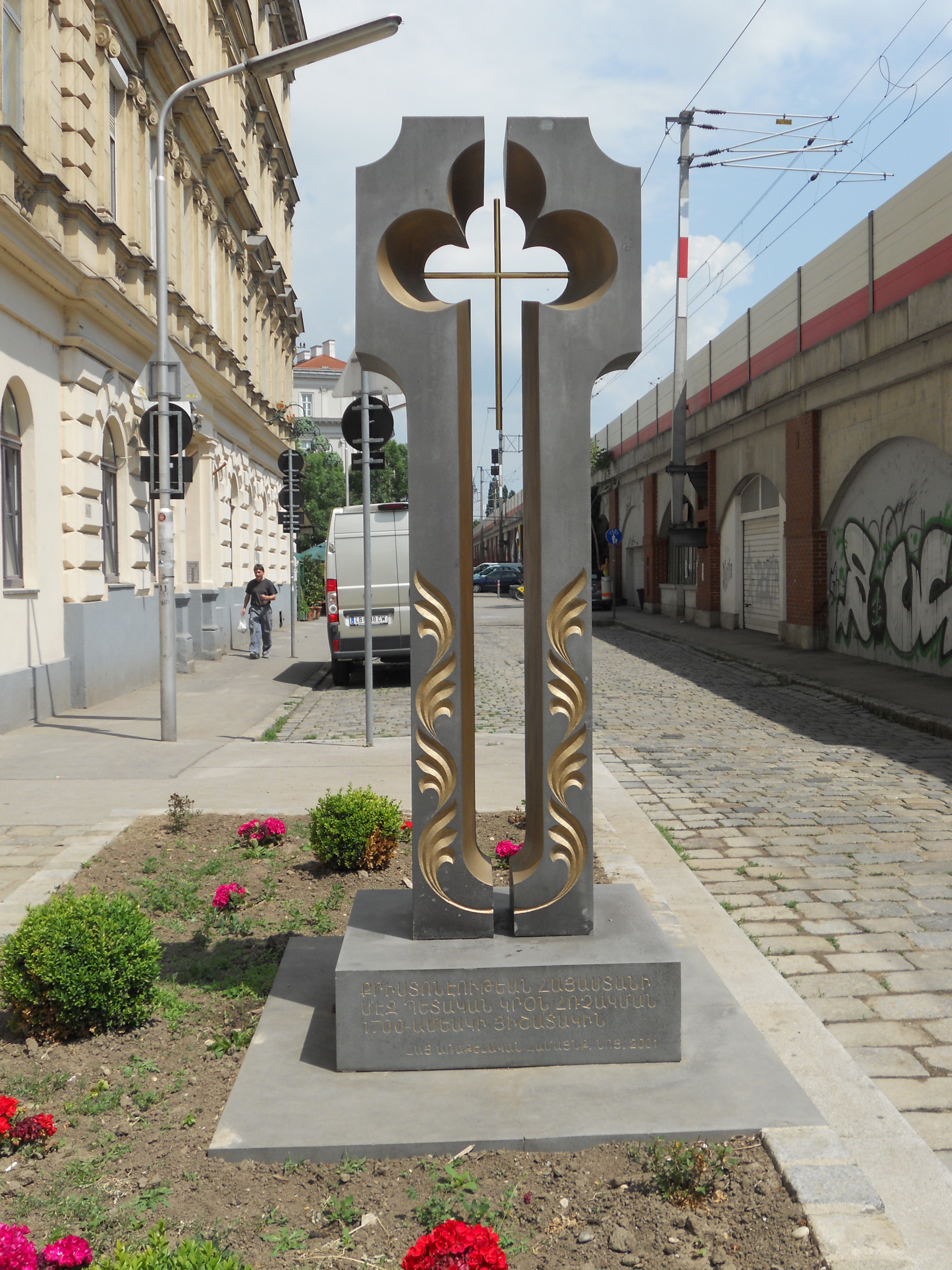 Kreuz aus dem Jahr 2001 Ecke Kolonitzgasse/ Obere Viaduktgasse in Wien, das an die Einführung des Christentums in Armenien im Jahr 301 erinnert.